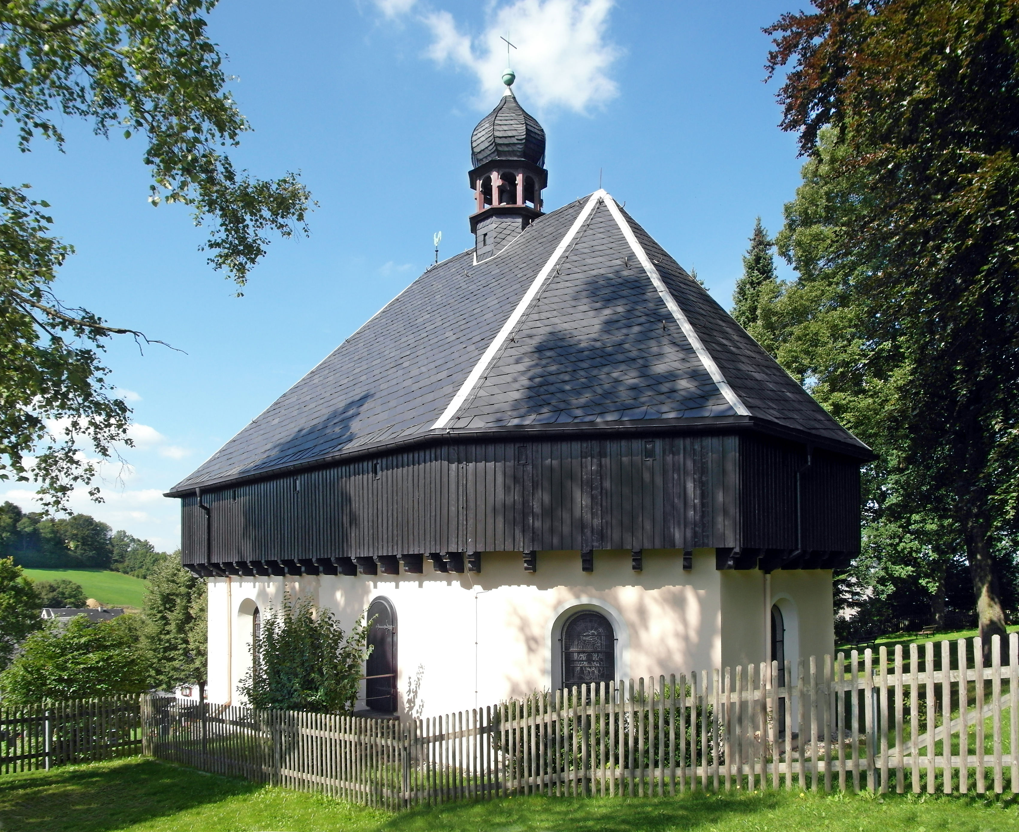 05.09.2017 09518 Mauersberg (Großrückerswalde), An der Kapelle (GMP: 50.608322,13.090924): Kreuzkapelle Mauersberg (1949-53), der 1889 abgerissenen Wehrgangkirche nachempfunden. [SAM1783.JPG]20170905400DR.JPG(c)Blobelt